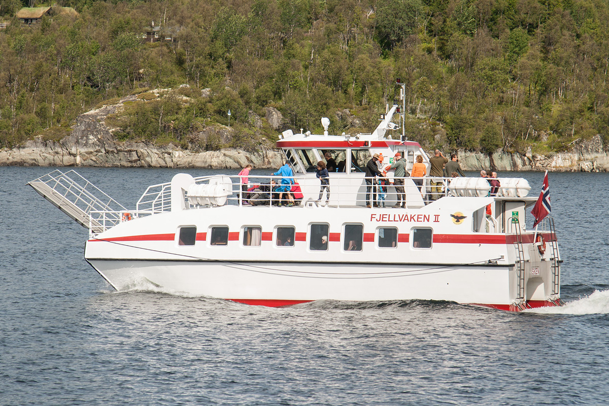 MB «Fjellvåken II» ved Skinnarbu.